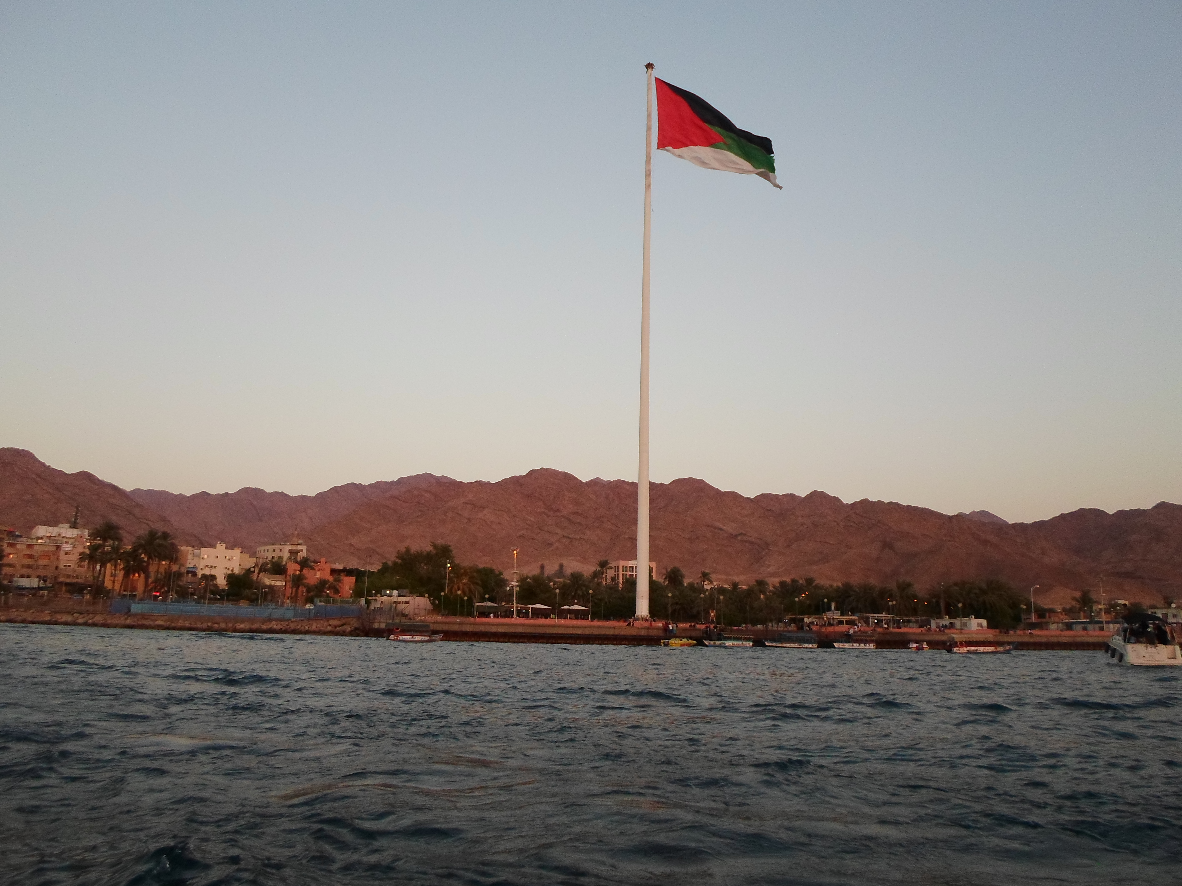 please ..let me speck in my language هذه الصورة التقطتها في جنوب الاردن في مدينة العقبة يظهر فيها علم الثورة العربية الكبرى الذي كان يوحد القبائل للتحرر من الاستعمار البيريطاني و يعد من اكثر المواقعة زيارتا في العقبة حيث يمتاز بارتفاعة الشاهق و الجلسات المميزة اللتي تحيط به